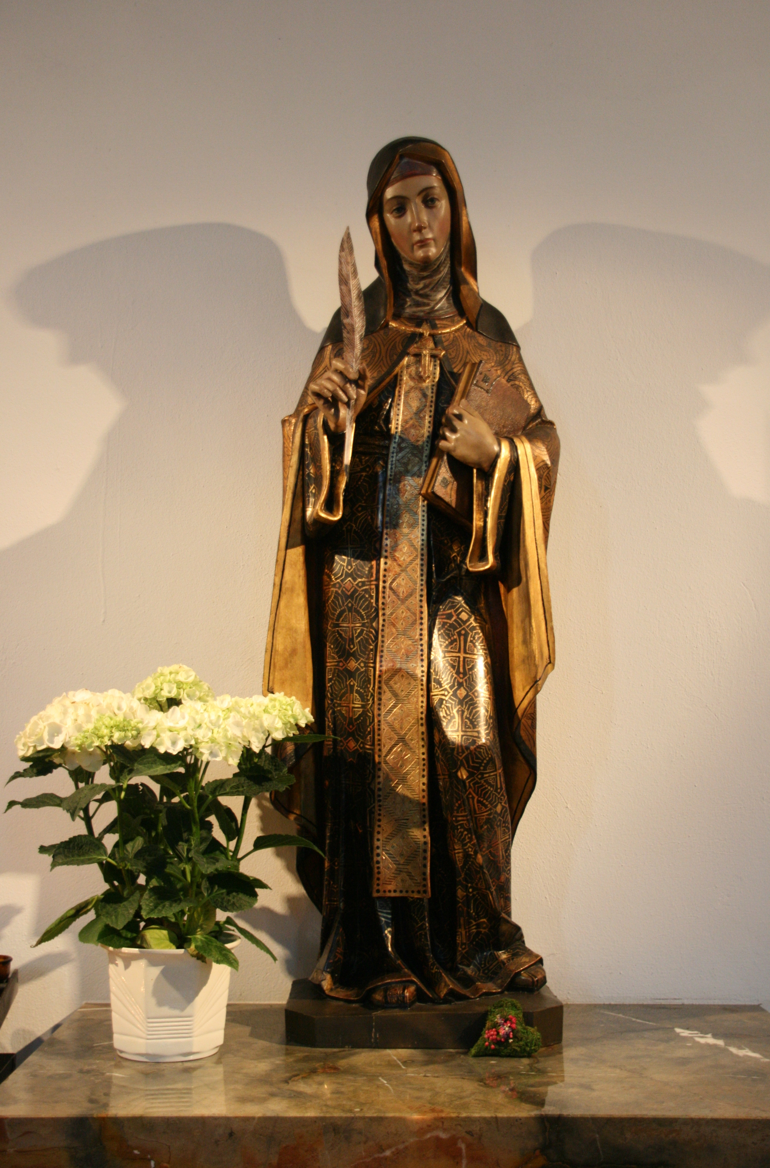 Skulptur der Hildegard von Bingen in der kath. Pfarrkirche St. Hildegard (Eibingen), Rüdesheim am Rhein. Um 1940 kam die Figur als Geschenk der Armen Dienstmägde Christi aus der Hildegardis-Schule zu Oberlahnstein nach Ebingen. Der Künstler ist bislang unbekannt. Attribute sind Pektorale, Schreibfeder und Buch.